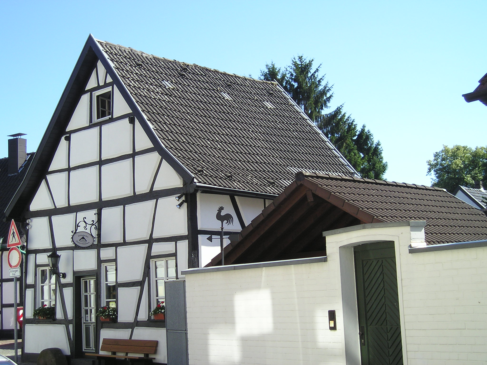 Fachwerkhaus in Düsseldorf-Urdenbach, Urdenbacher Bauernlädchen